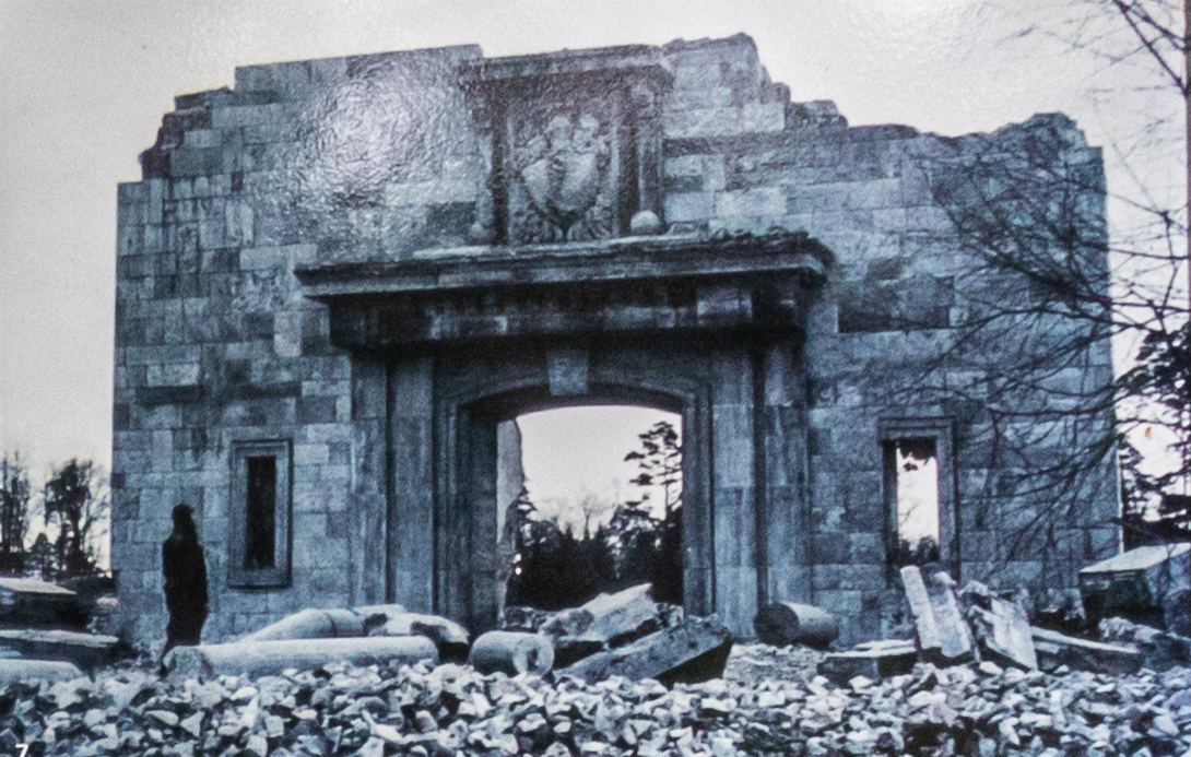 Gedenktafel Carinhall